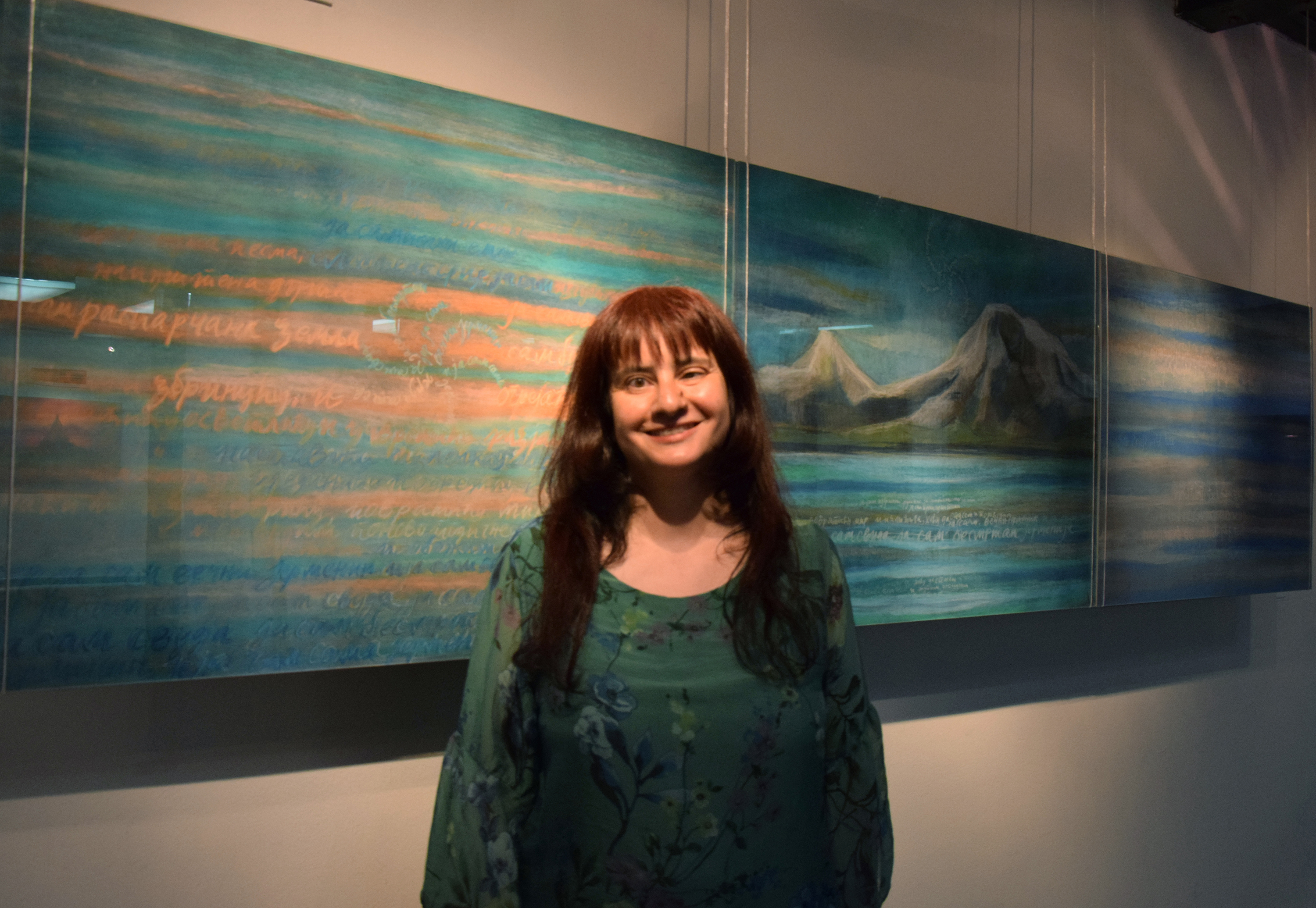 Др Анамарија Вартабедијан, доктор уметности, сликар, графички дизајнер и уметнички фотограф јерменско-српског порекла.